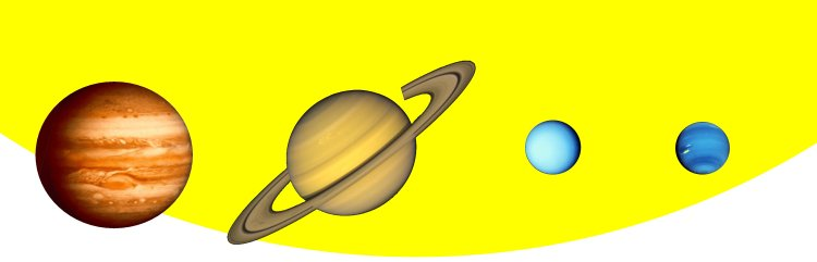 Les géantes gazeuses devant le limbe du Soleil, à l'échelle 1 px = 1 Mm Les diamètres sont à l'échelle. Le limbe du Soleil apparaît en arrière-plan. De gauche à droite, Jupiter, Saturne, Uranus et Neptune. Image préparée par moi-même à partir des images du NSSDC (National Space Science Data Center); j'en fais don au domaine public.